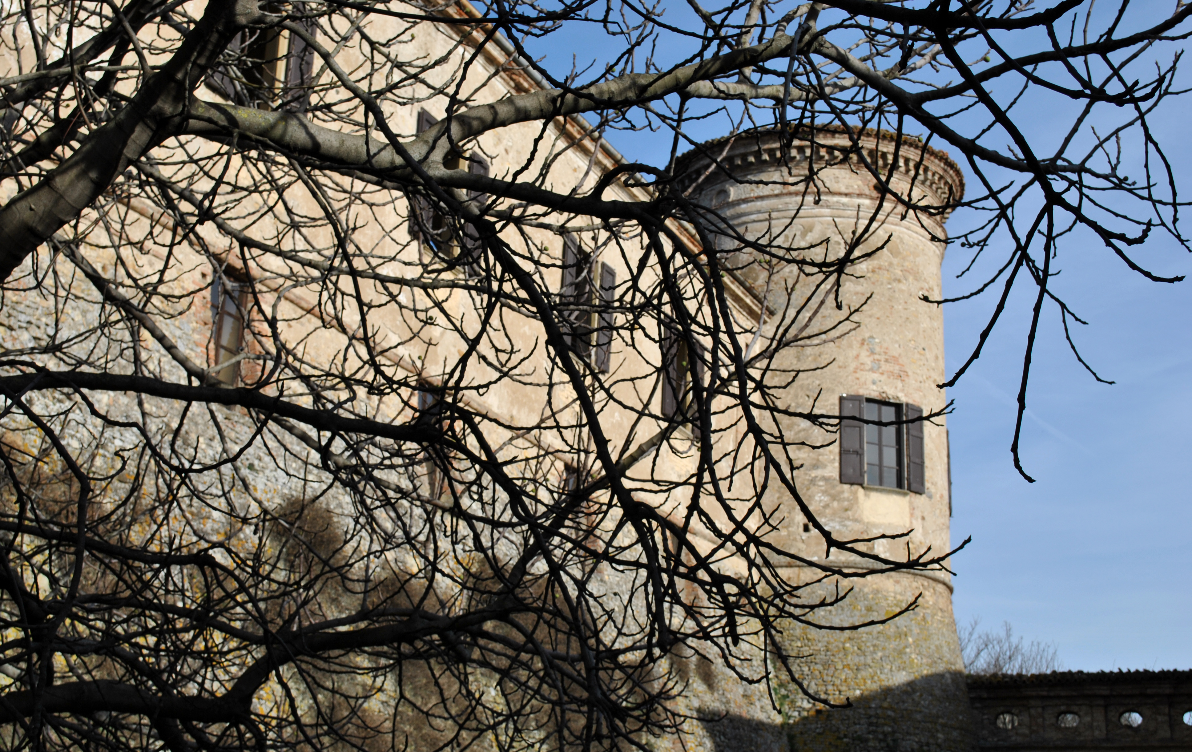 Castello di Scipione dei Marchesi Pallavicina - MIBAC This is a photo of a monument which is part of cultural heritage of Italy.